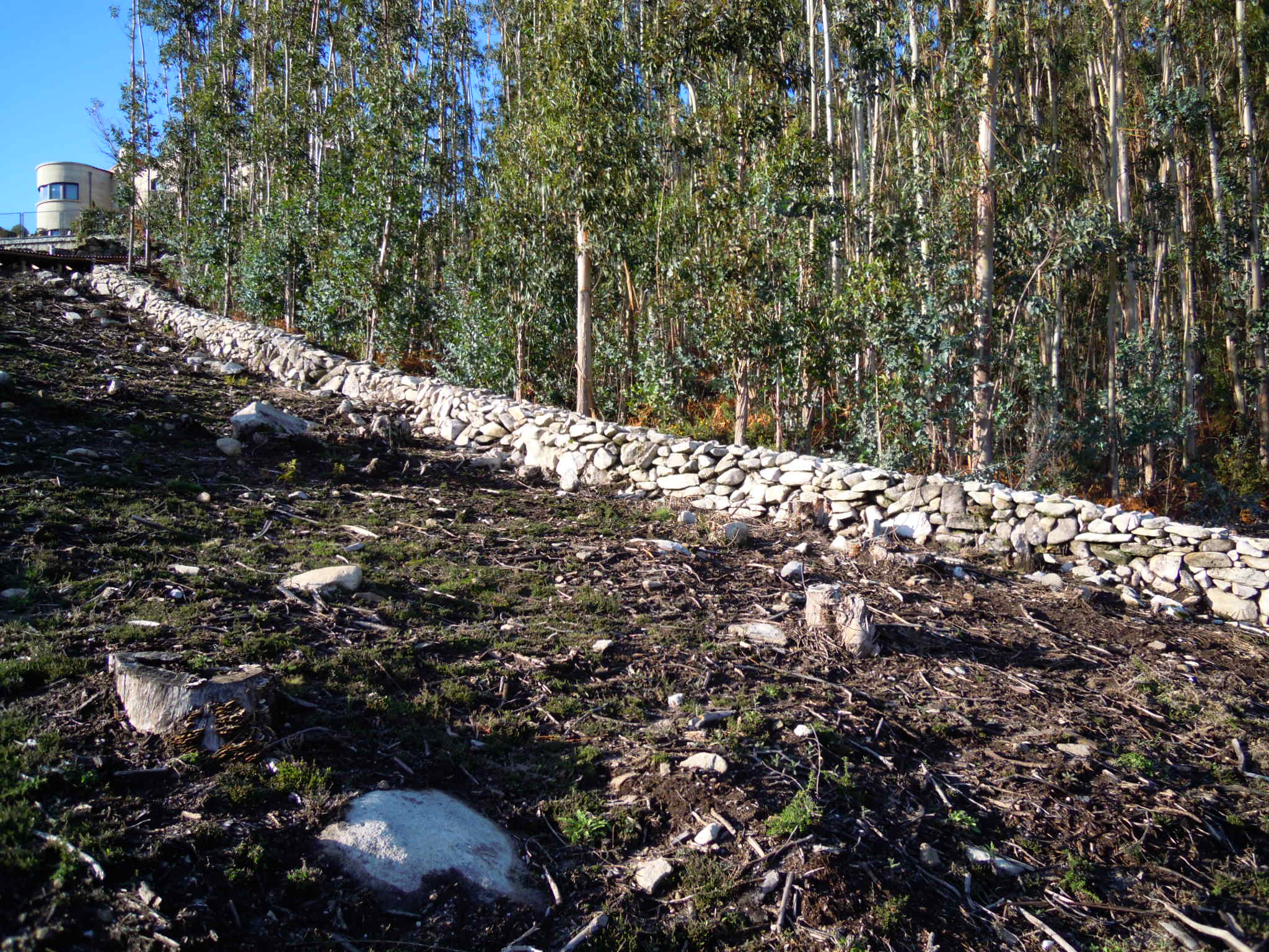 Muro entre dúas leiras lindeiras na Caeira (Poio).